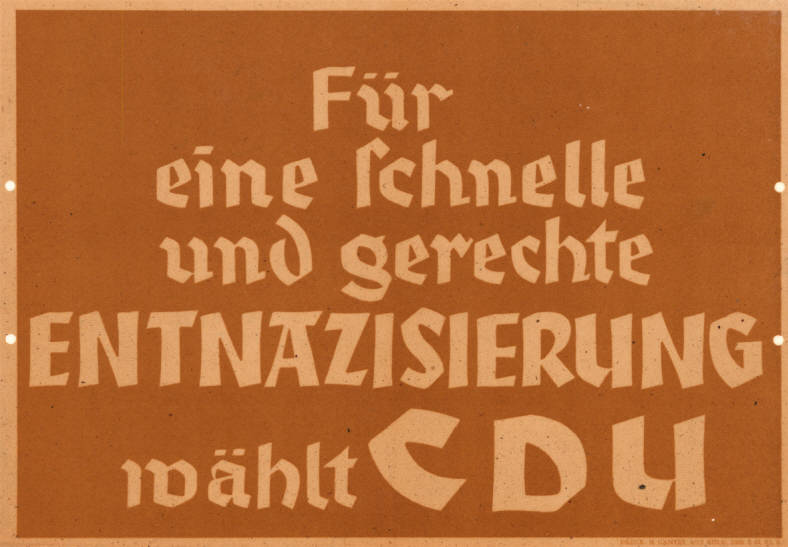 Für eine schnelle und gerechte Entnazisierung wählt CDU Plakatart: Textplakat Allgemein Drucker_Druckart_Druckort: H. Ganter AU/2 Köln, 5500, 3.47, Kl. B. Objekt-Signatur: 10-009 : 17 Bestand: Landtagswahlplakate Nordrhein-Westfalen (10-009) GliederungBestand10-18: Landtagswahlplakate Nordrhein-Westfalen (10-009) » Landtagswahl am 20.4.1947 » CDU » Allgemein Lizenz: KAS/ACDP 10-009 : 17 CC-BY-SA 3.0 DE